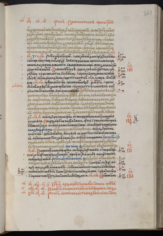 Новазапаветны тэкст «Дзесятаглава», перапісаны рознакаляровымі чарніламі і золатам. Каліграфія Мацвея Дзясятага